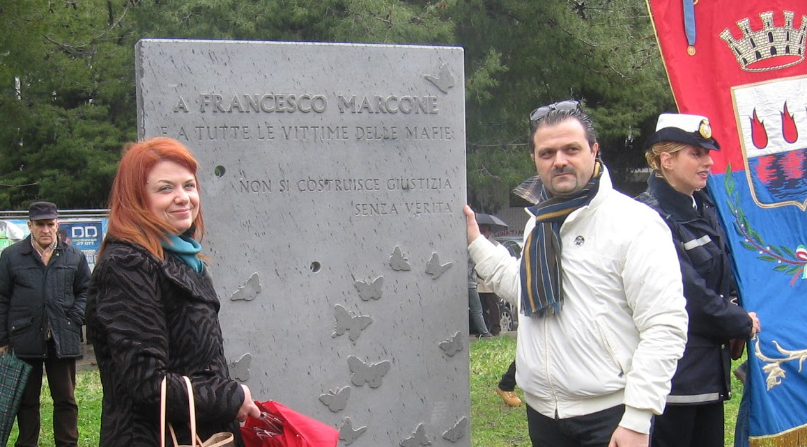 A sinistra Daniela Marcone, a destra Paolo Marcone che inaugurano il monumento eretto per la morte del padre Francesco Marcone